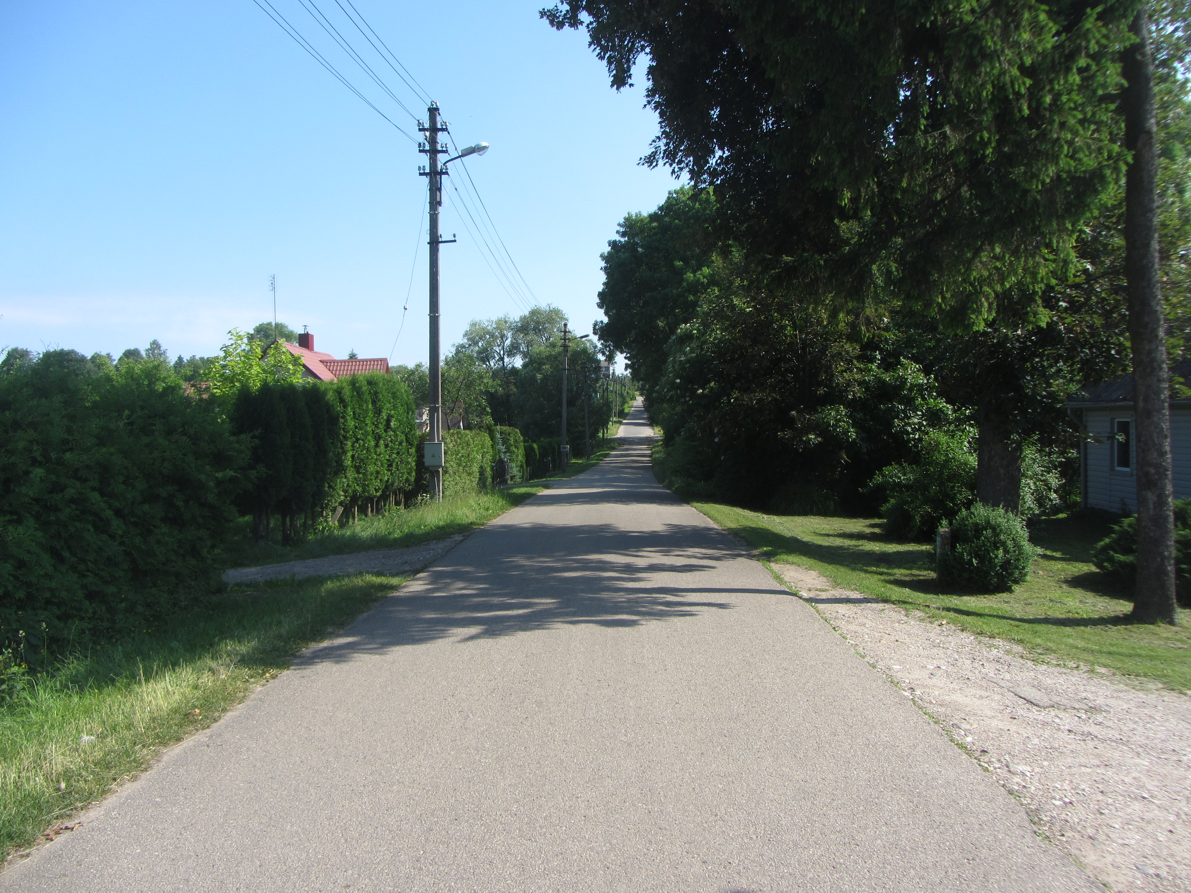 Jieznas, Lithuania